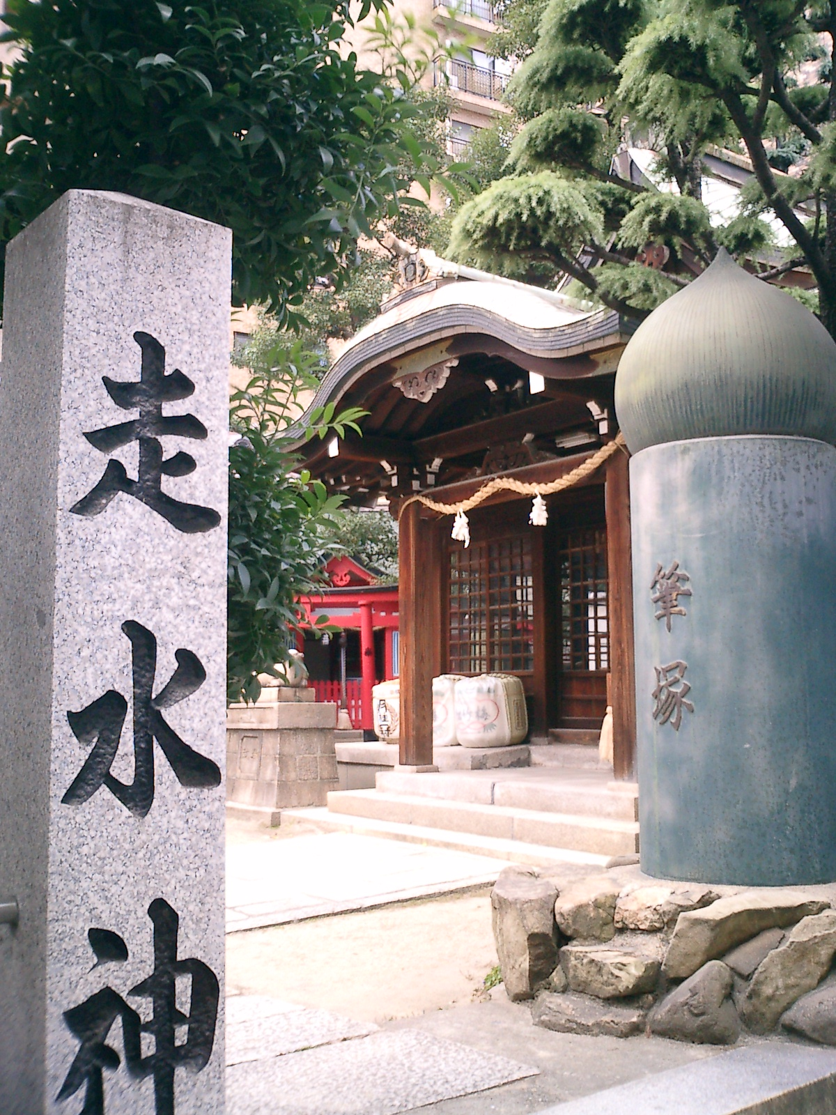 Hashiudo_Jinja